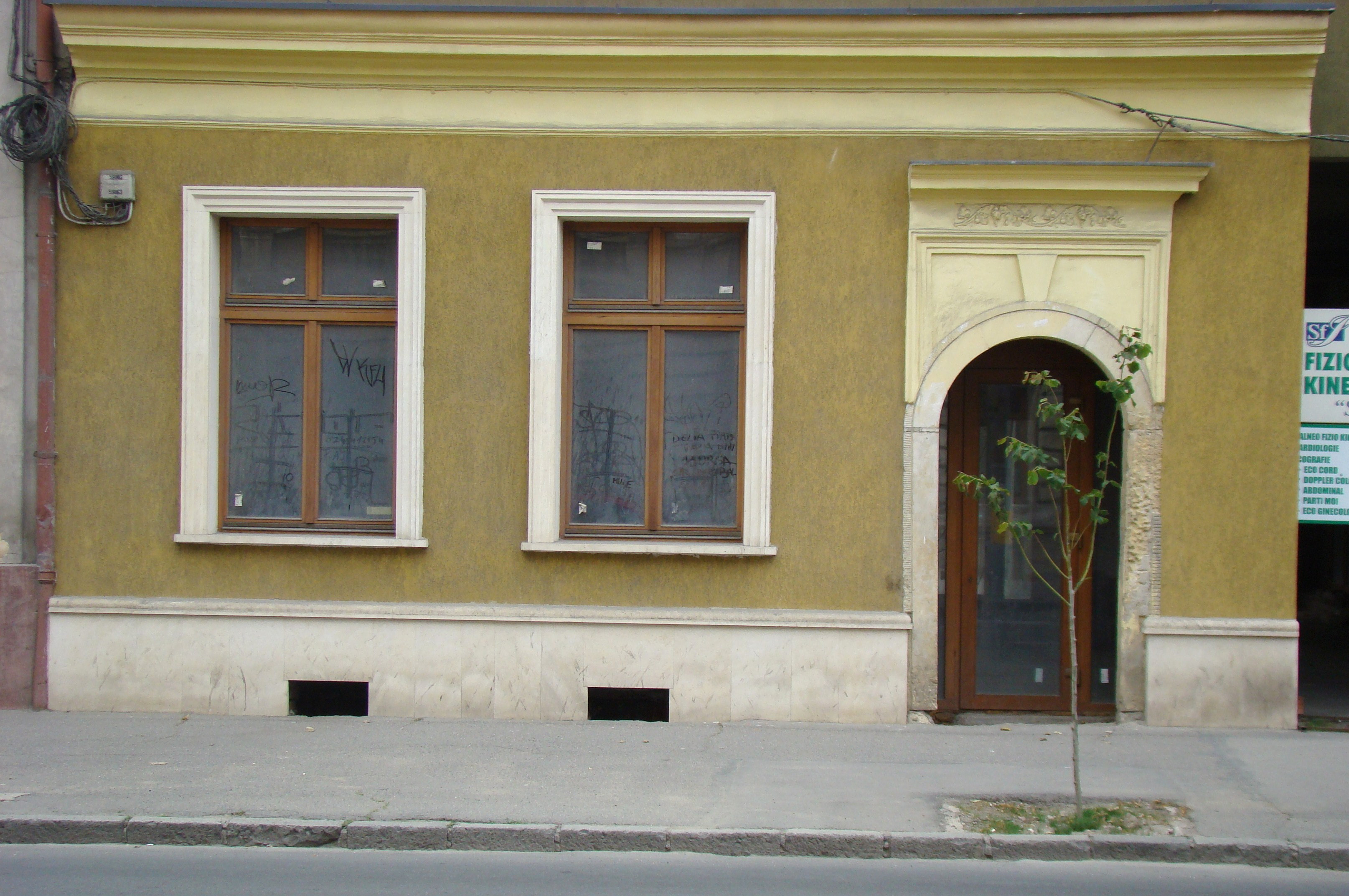 Clădire monument istoric, Calea Moților, nr. 32 (Casa în care a locuit Ilie Măcelaru)